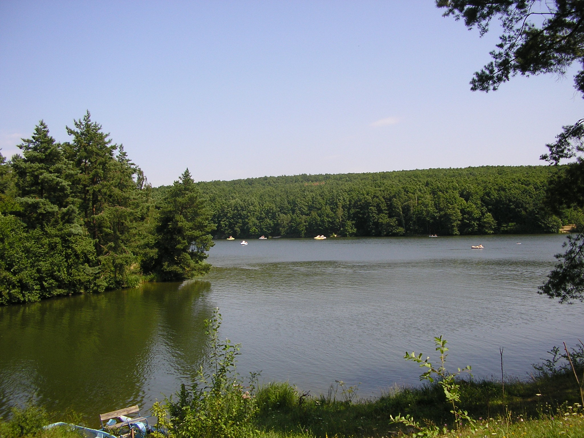 Duchonka